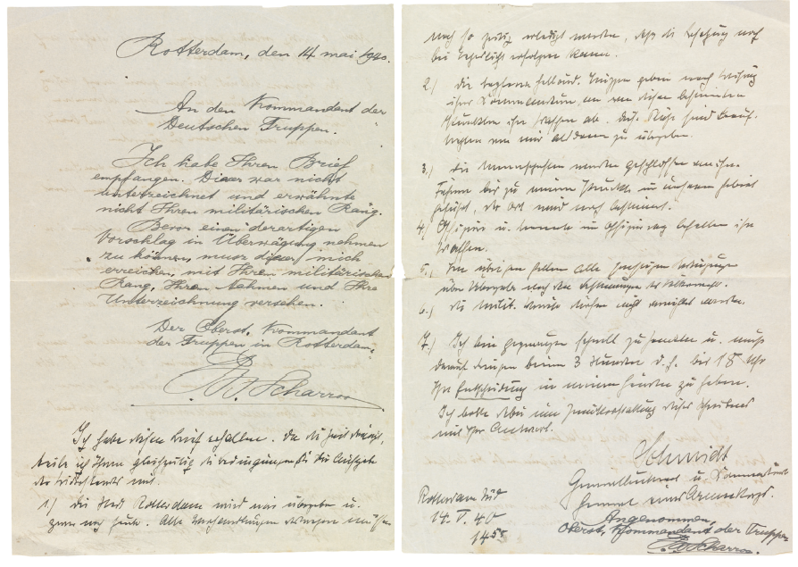 Het tweede ultimatum en tevens capitulatiedocument van de stad Rotterdam. Rotterdam, den 14 mai 1940 An den Kommandant der Deutschen Truppen. Ich habe Ihren Brief empfangen. Dieser war nicht unterzeichnet und erwähnte nicht Ihren militärischen Rang. Bevor einen derartigen Vorschlag in Übersägung nehmen zu können, muss dieser mich erreichen, mit Ihrem militärischen Rang, Ihren Nahmen und Ihre Unterzeichnung versehen. Der Oberst Kommandant der Truppen in Rotterdam Scharroo